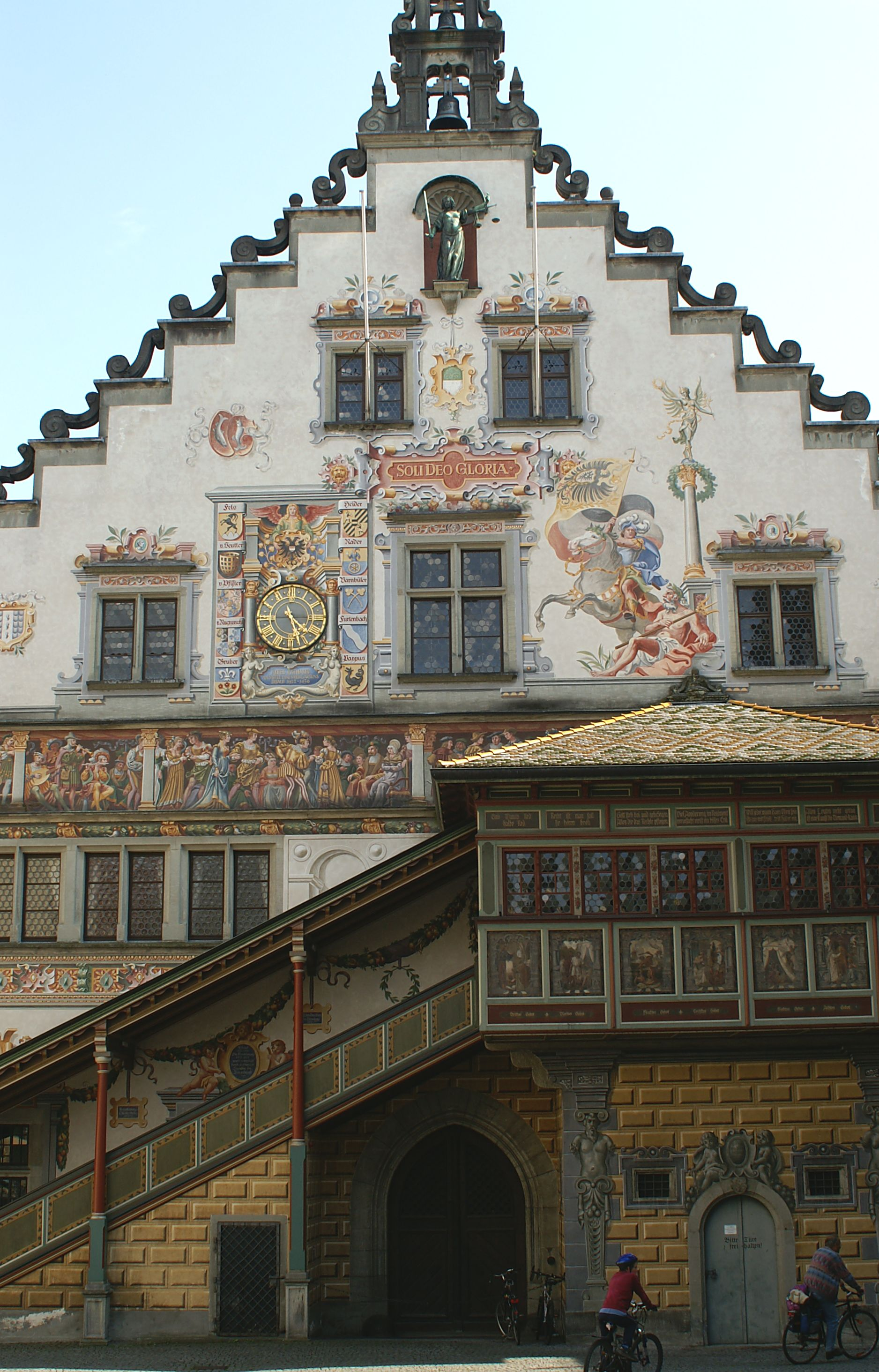 Lindau am Bodensee